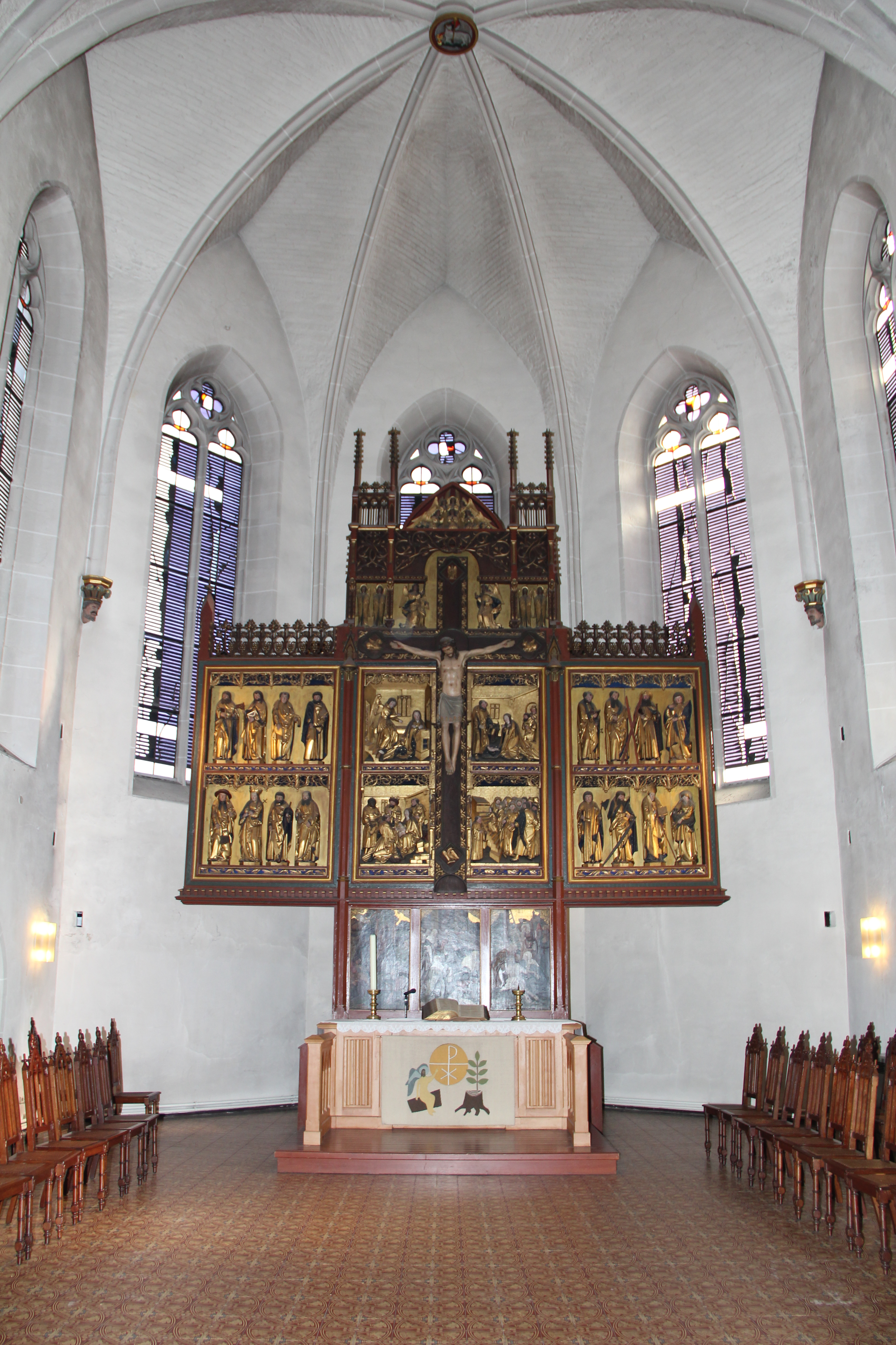 Chorraum der Sankt-Marien-Kirche in Göttingen